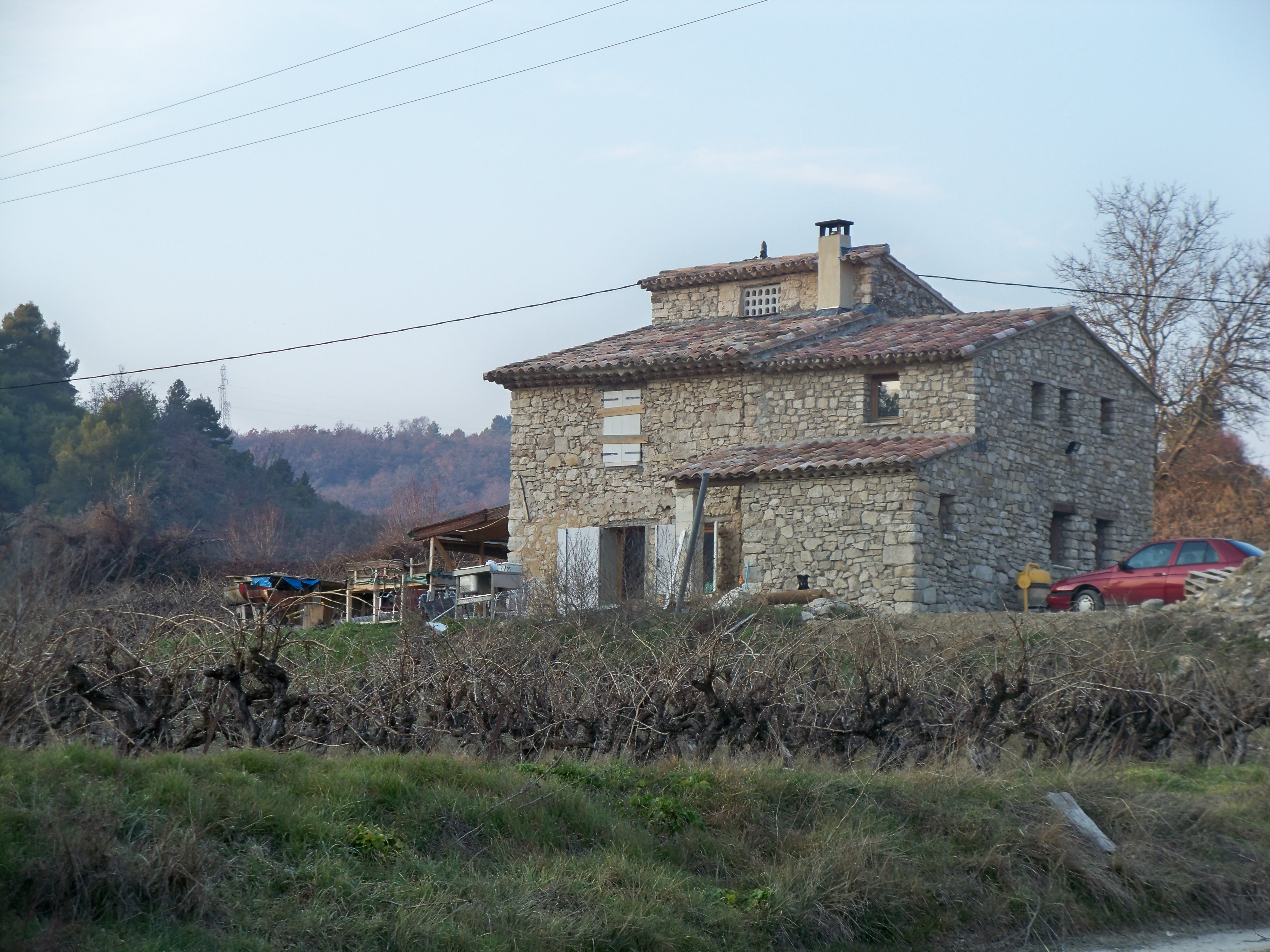 Maison à terre à Apt, Vaucluse, France